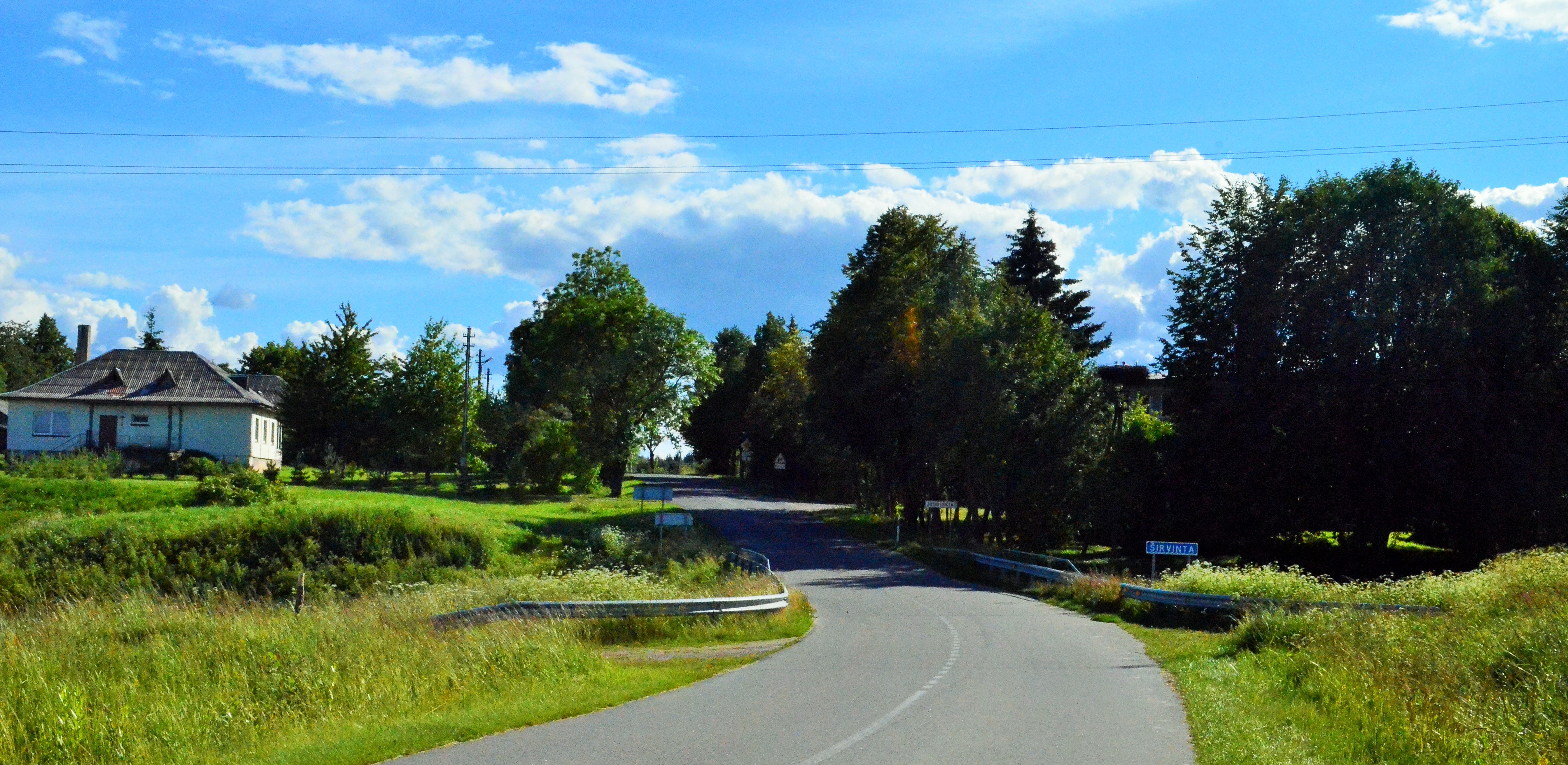 Juodiškiai, Širvintų raj.